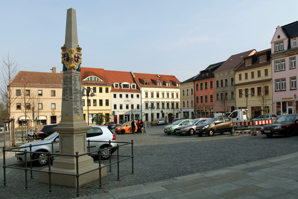 Radeberger Marktplatz mit Postmeilensäule